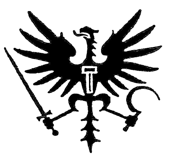 Logo des éditions Ars (figurant ici en couverture du reprint des Cahiers du Cercle Proudhon, 1912, dont c'était l'emblême), réutilisé dans les années 1930 en couverture de la revue Widerstand d'Ernst Niekisch.